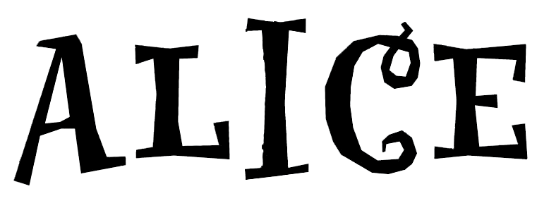 Logotipo usado para la portada del sencillo "Alice" de Avril Lavigne